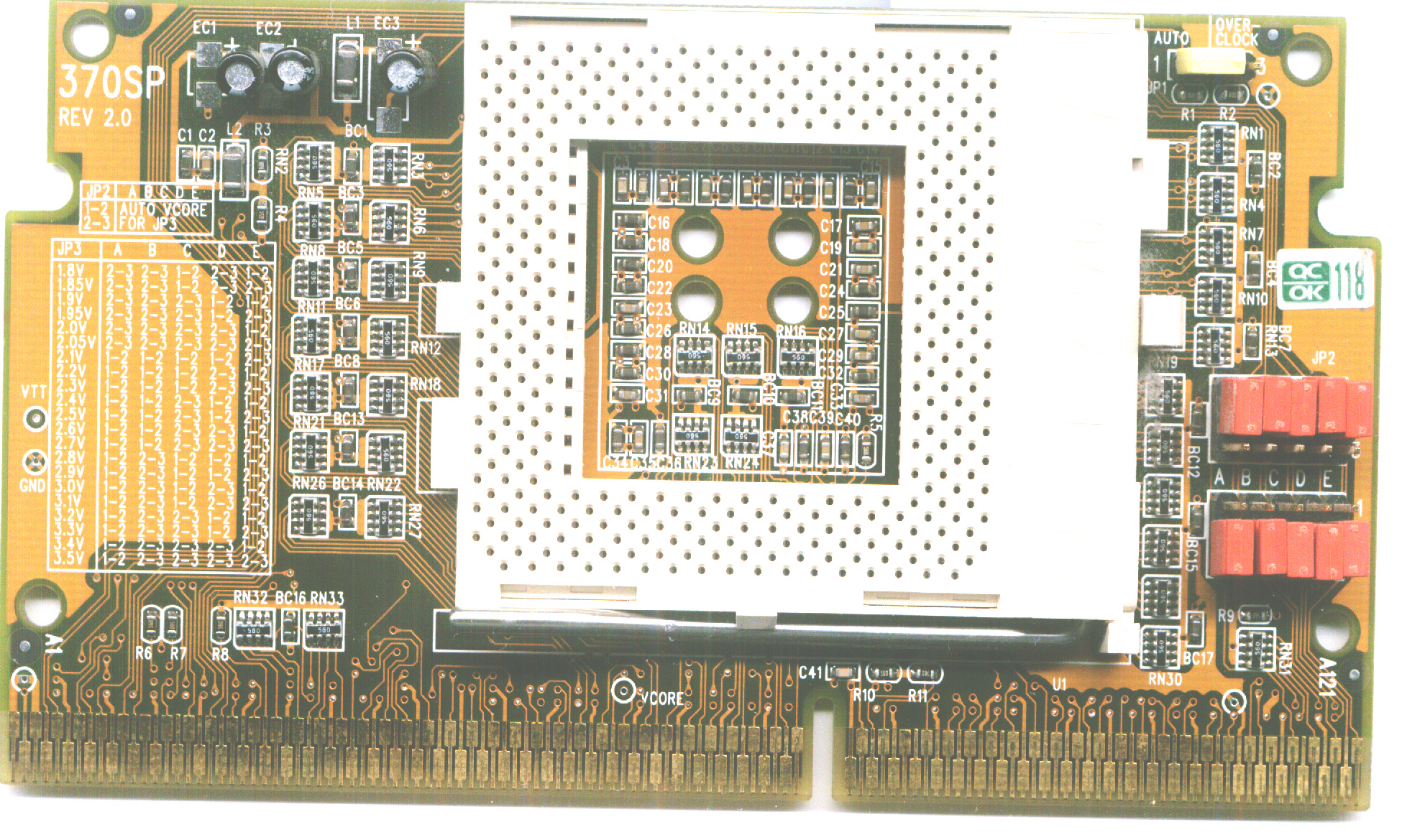 adapter slot1 - socket 370